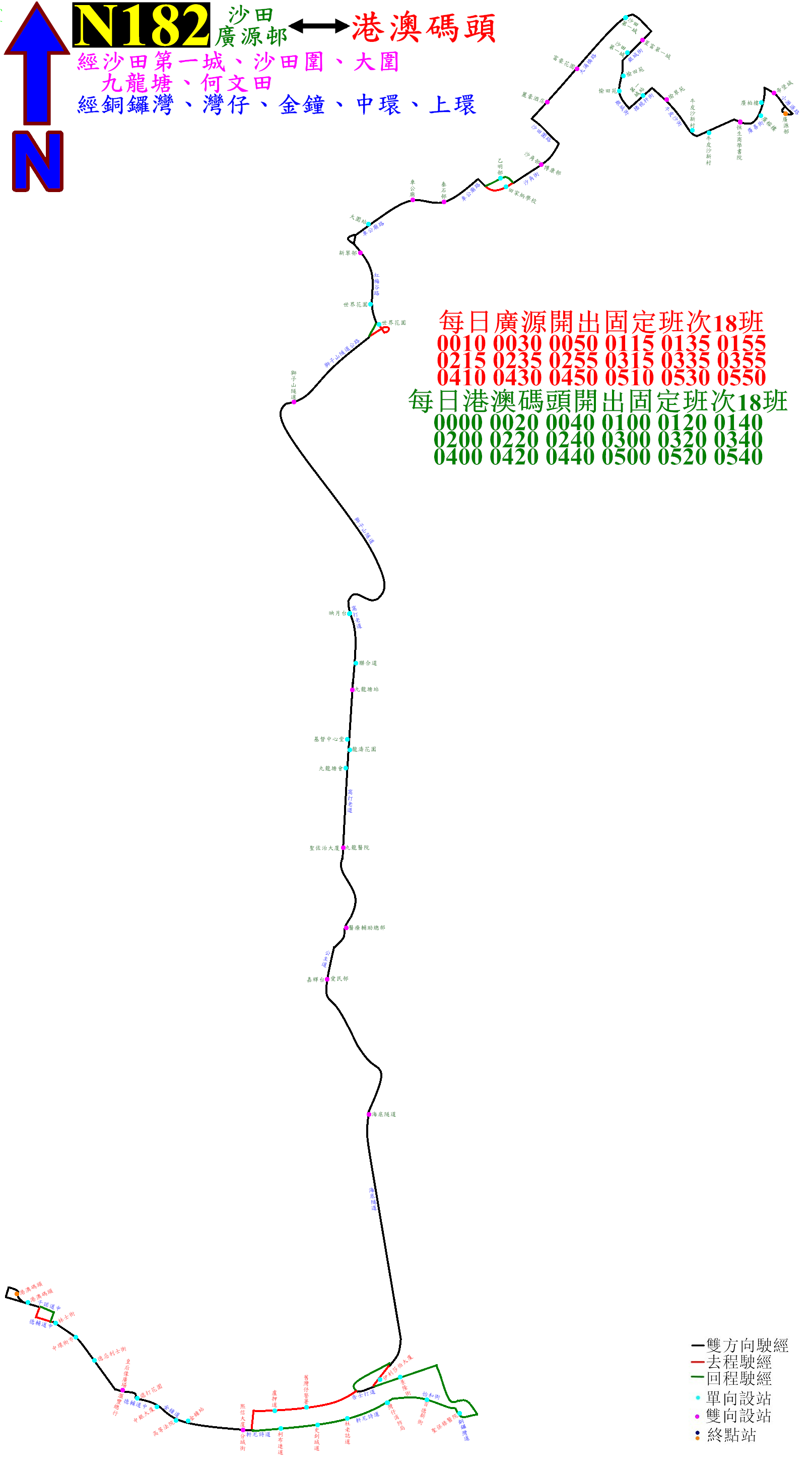 中文（香港）: 過海隧巴N182線的走線圖